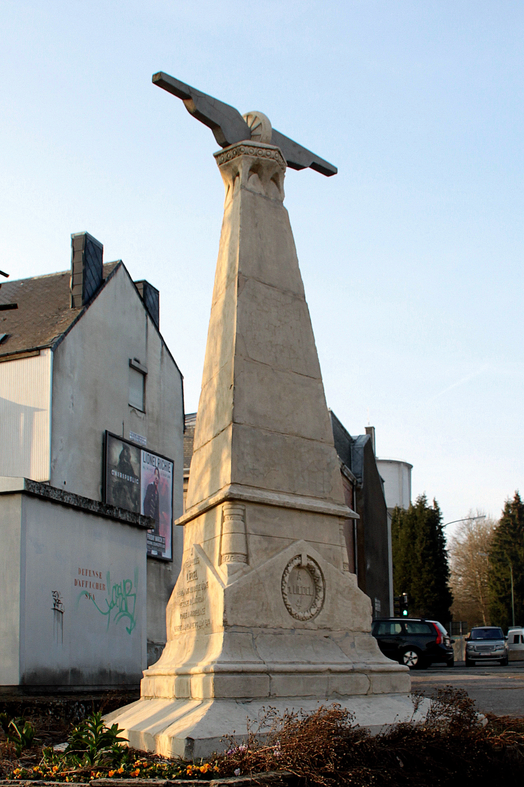 Monument Felix Liedel zu Arel